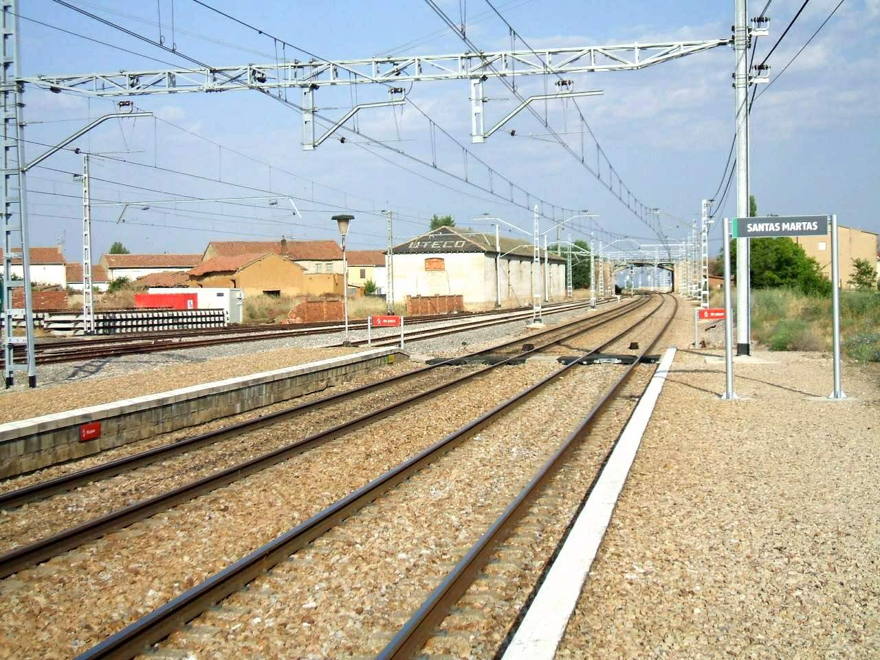 Estación de Santas Martas (Valdearcos, Santas Martas, León)